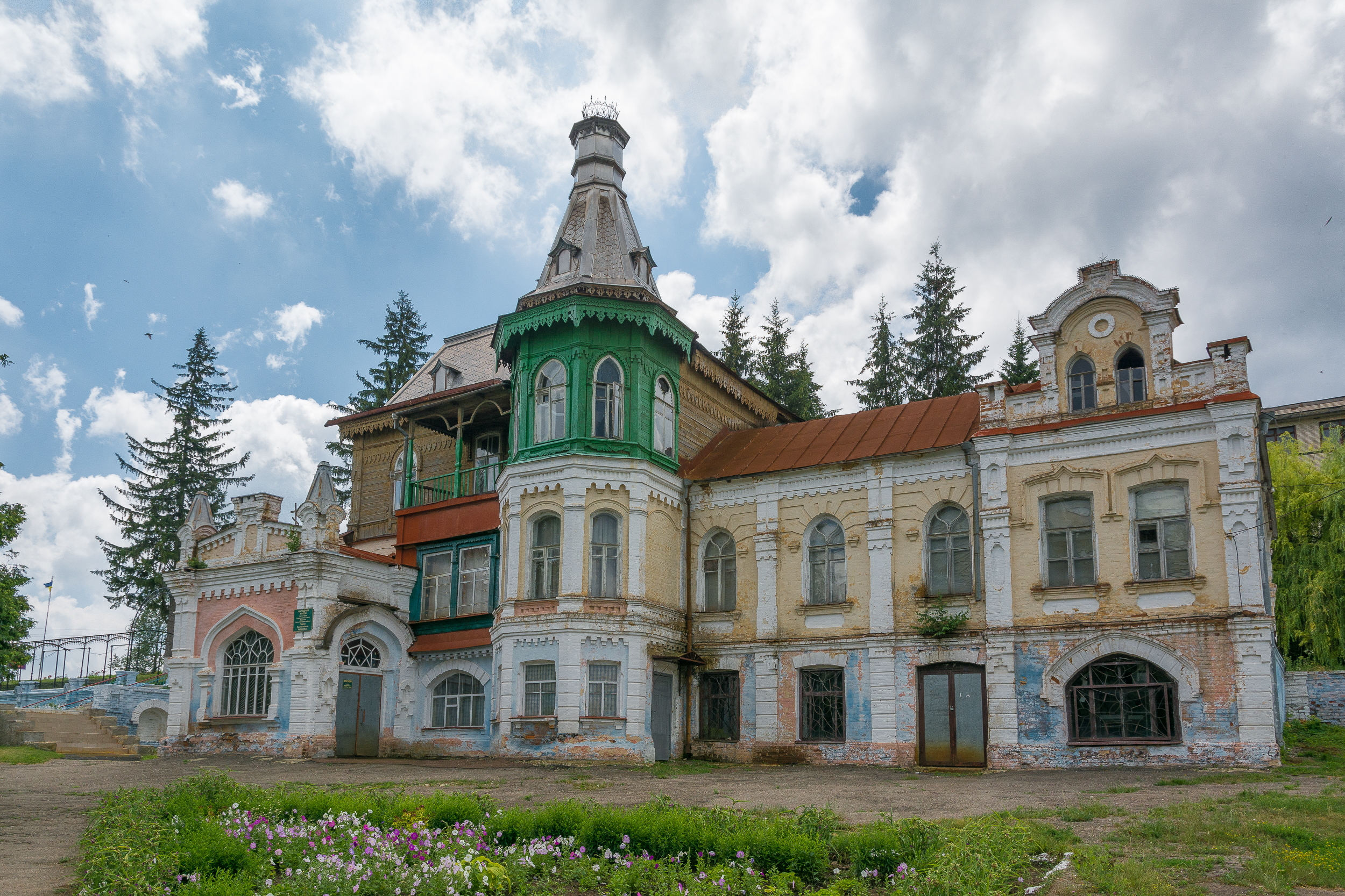 Будинок управителя цукрозаводу (зміш.), село Малий Вистороп, вул. Рибалка, 3